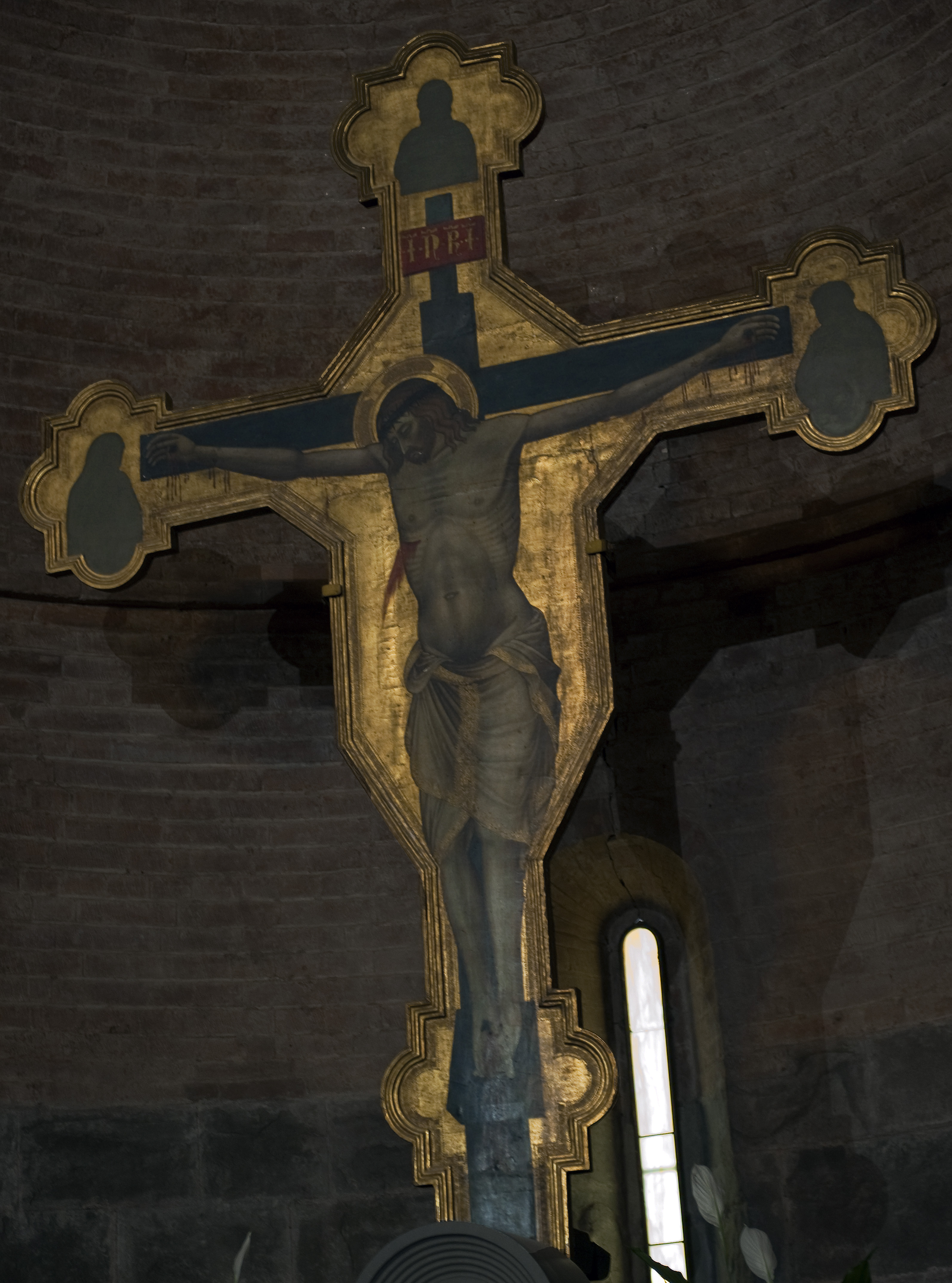 Crocifisso, del Maestro di San Martino a Mensola , conservato nella chiesa di san Pietro a marcignana, Empoli